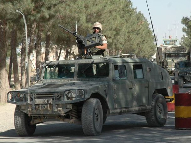 Presencia militar en Herat (2005).